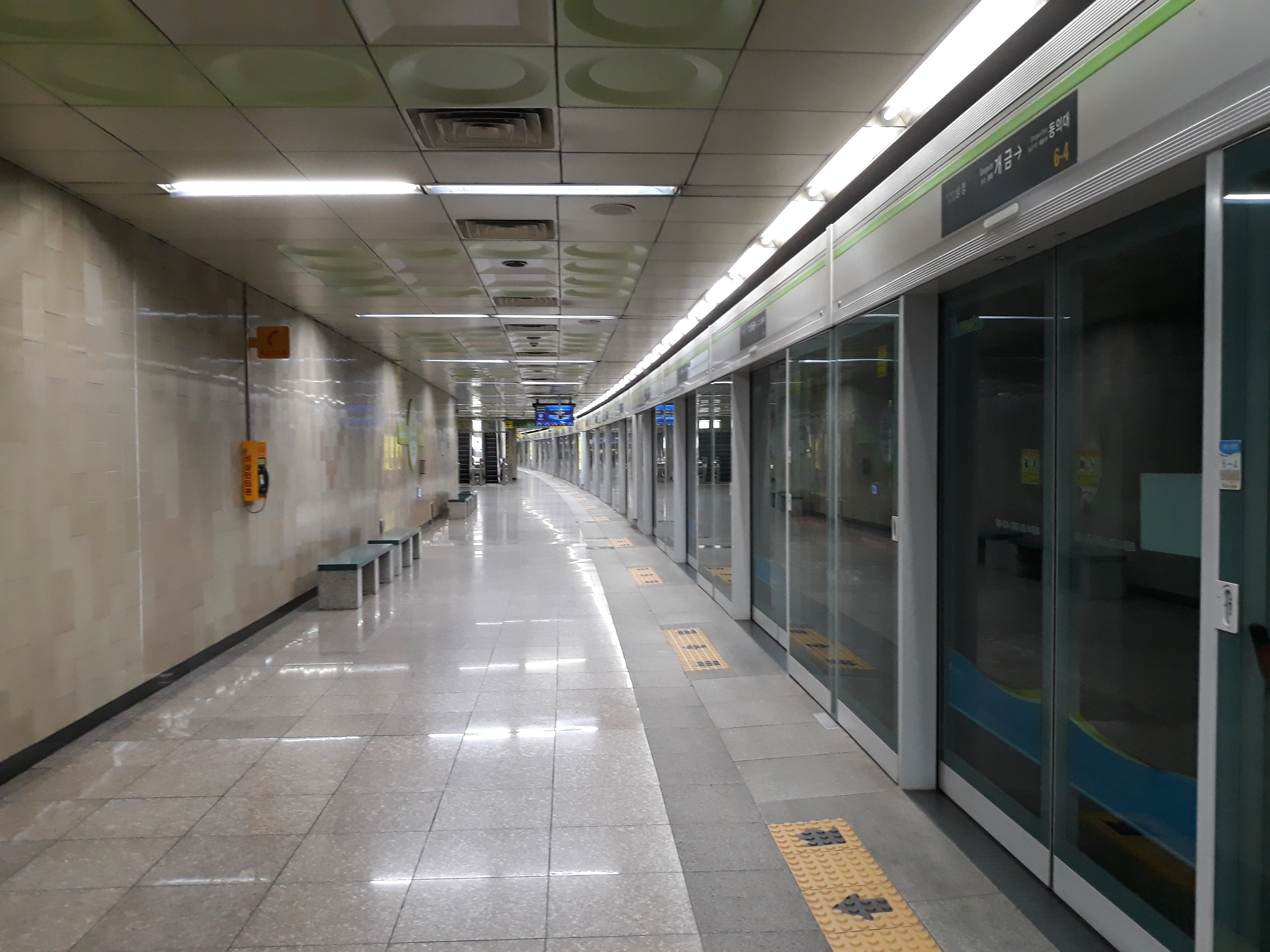 부산 도시철도 2호선 개금역 장산 방면 승강장